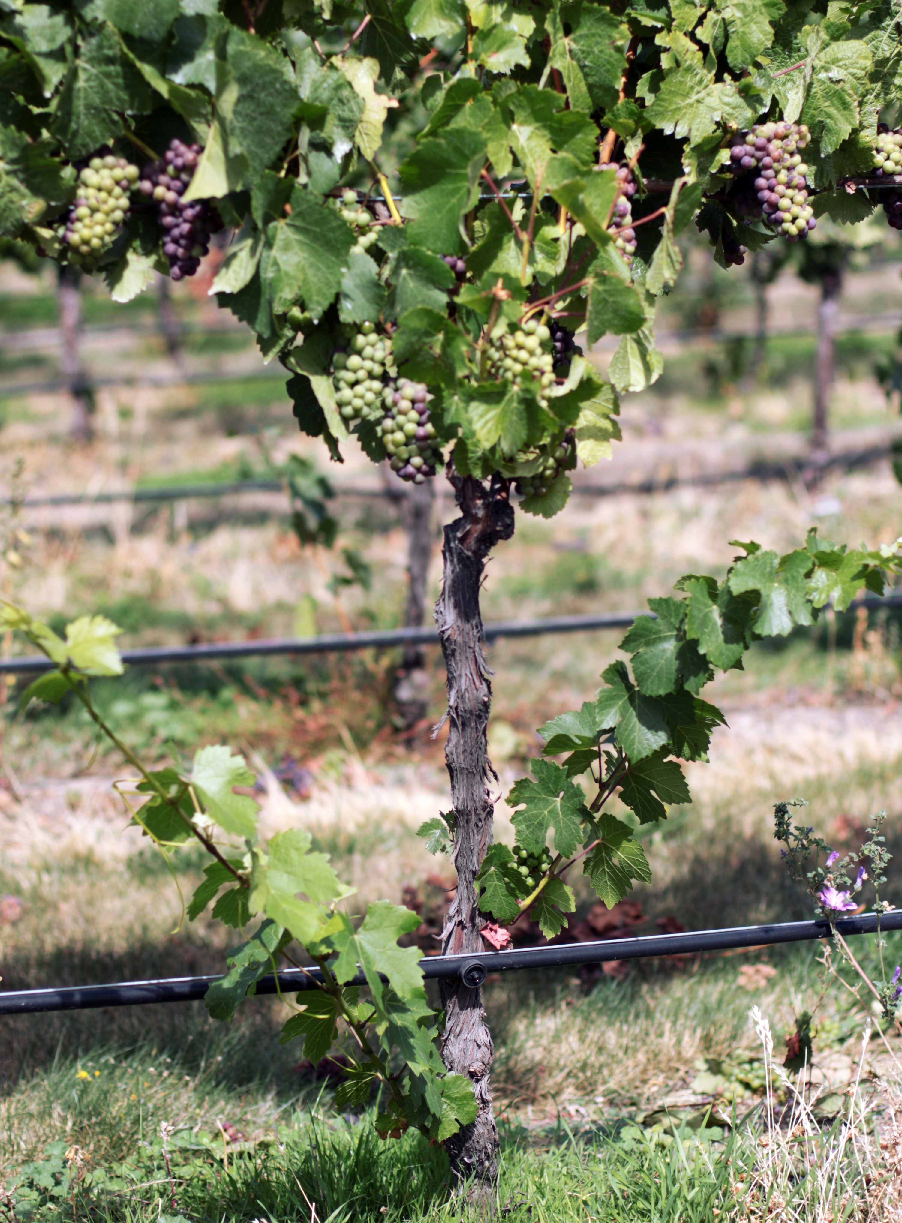 Gourmands sur un pied de vigne de Pinot Noir